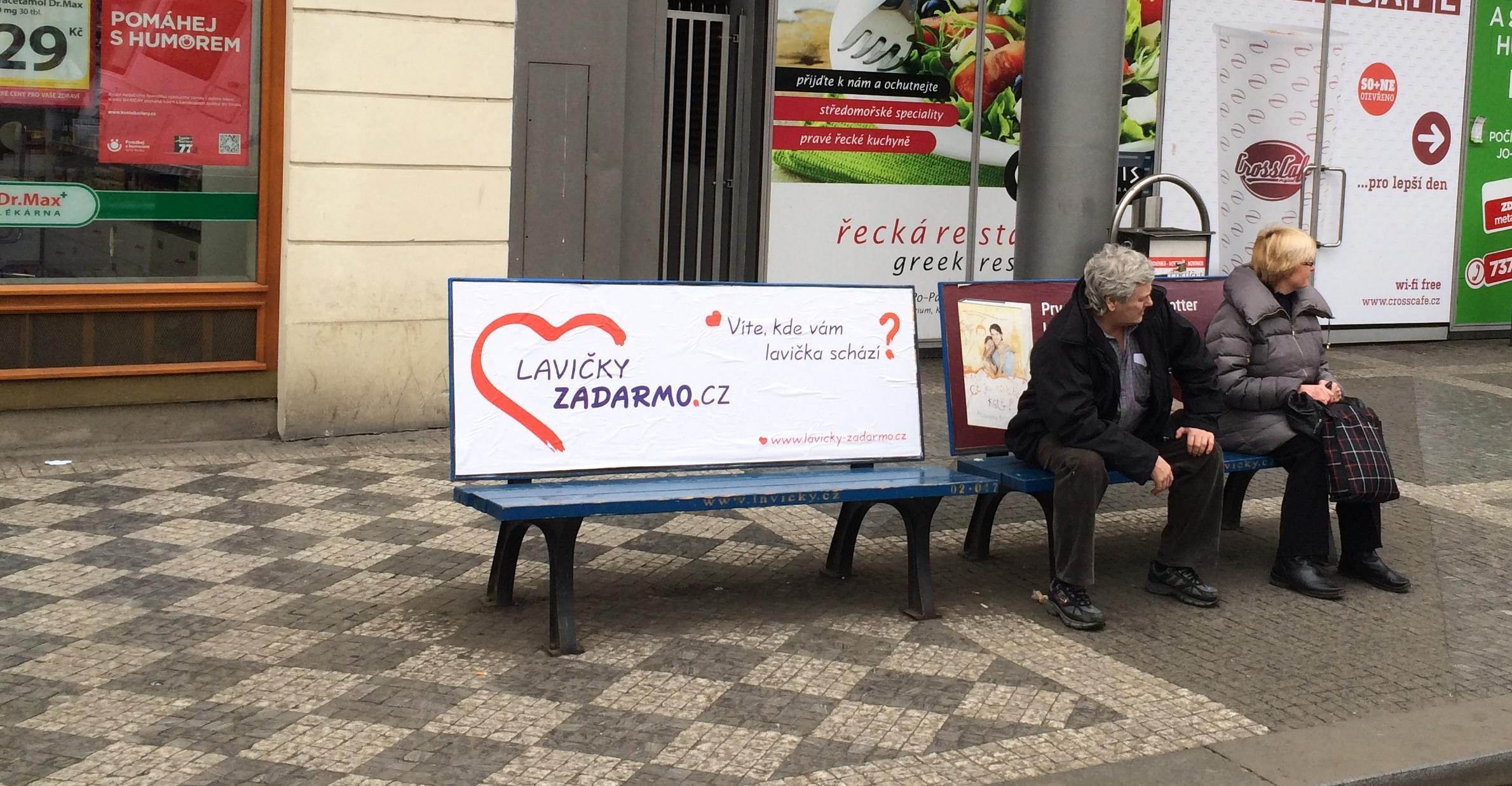 Lavičky-Zadarmo.cz na autobusové zastávce MHD Karlovo náměstí v Praze.